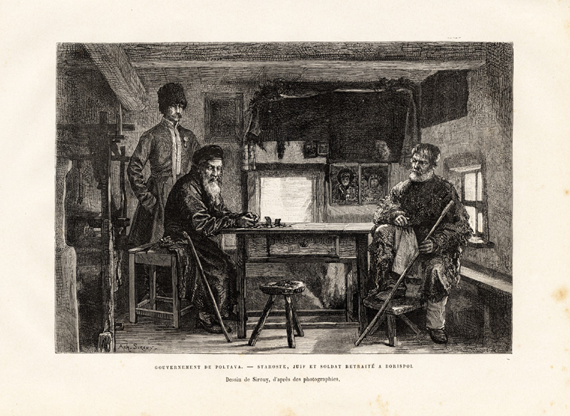 'Gouvernement de Poltava - Staroste, Juif et soldat retraite a Borispol.' (The Poltava Governorate - Starosta, Jew and soldier relaxing in Boryspil, Ukraine). 'Nouvelle Geographie Universelle La Terre et les Hommes V : L' Europe Scandinave, Russe etc.' by Jacques Elisee Reclus, published in Paris by Hachette & Cie., 1880